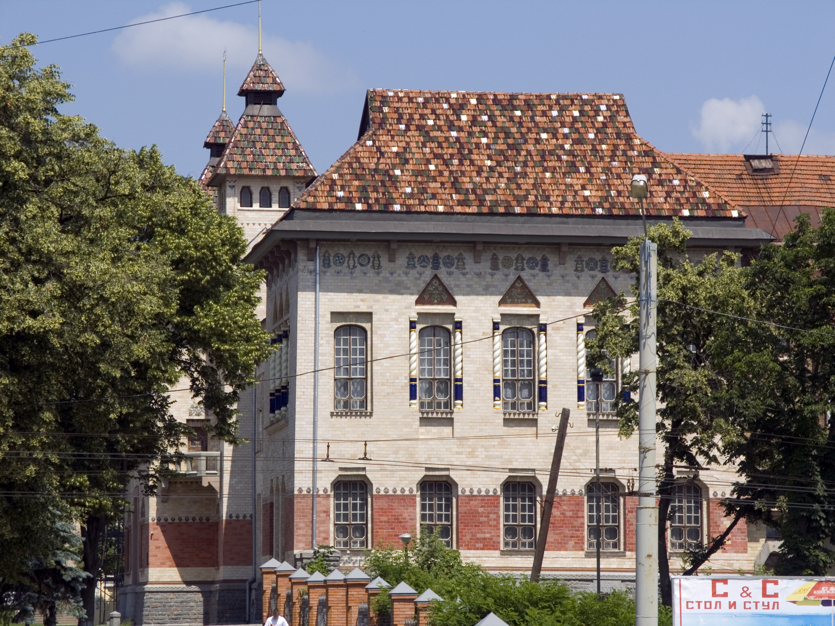 Україна, Полтава - Будинок губернського земства